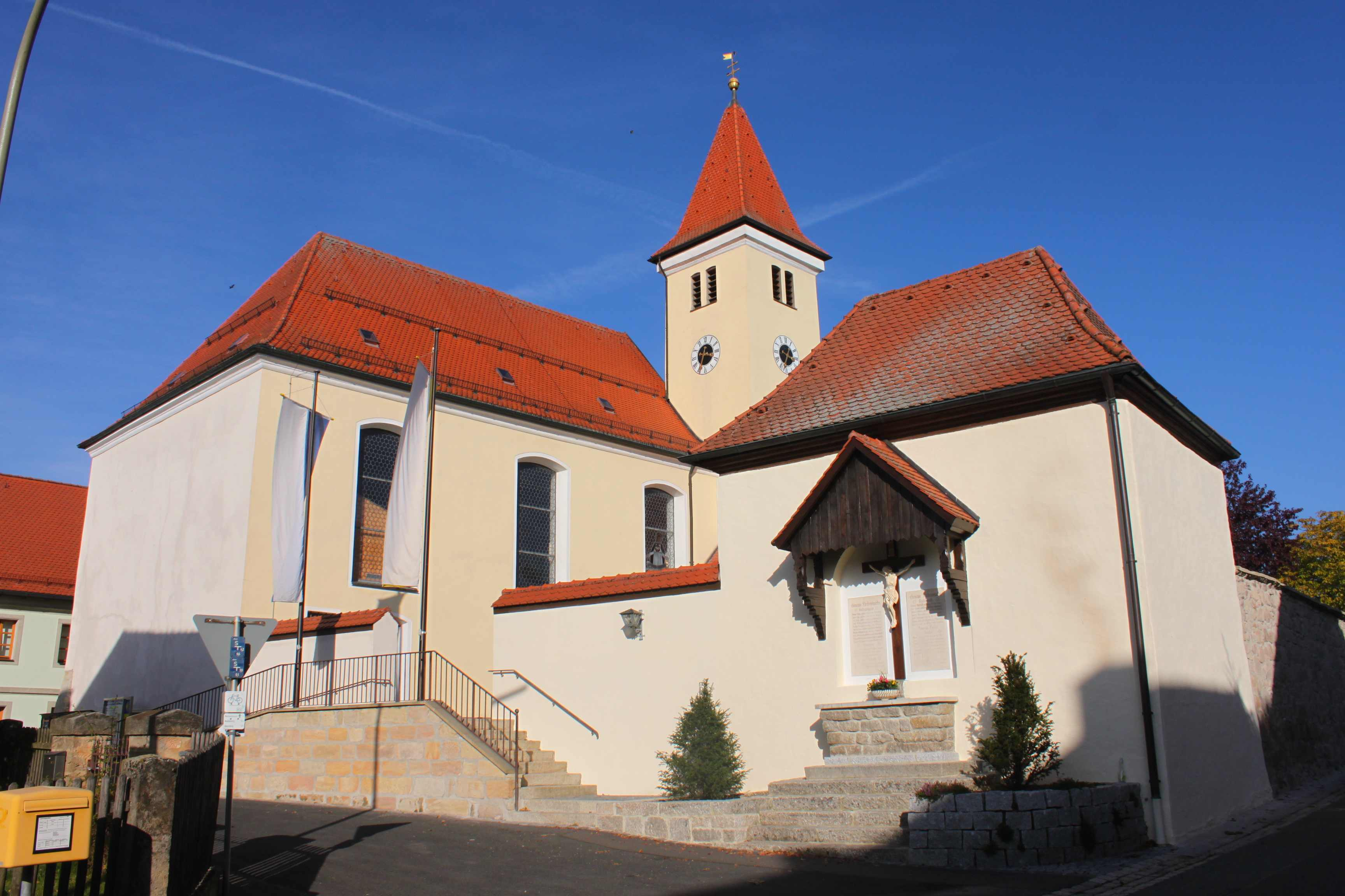 Die katholische Pfarrkirche St. Jakobus major stammt aus den Jahren 1690-1691. Turm wurde jedoch erst Mitte des 18. Jahrhunderts erbaut und später noch erhöht